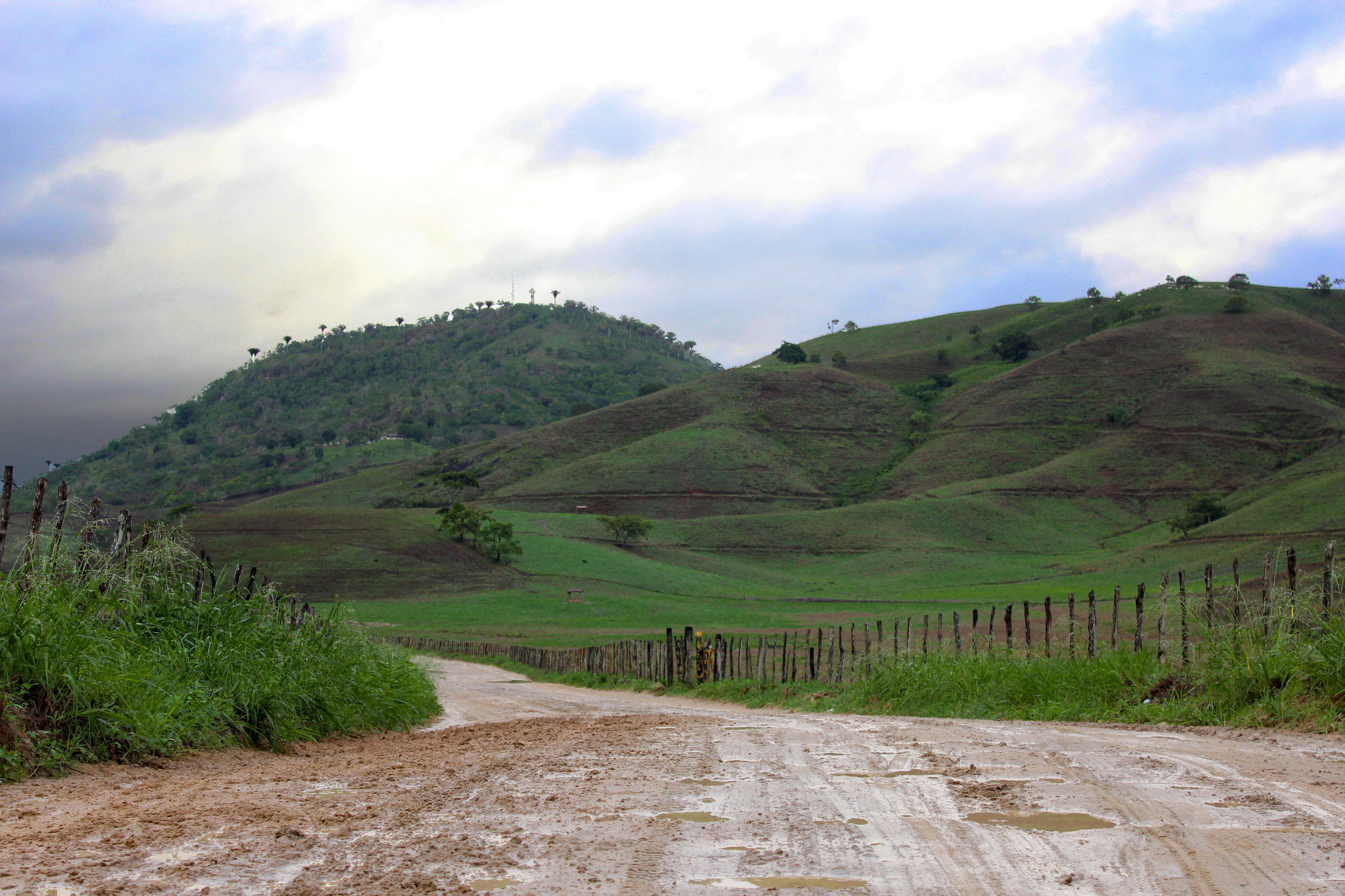 Serra da Barriga em dia de muita chuva